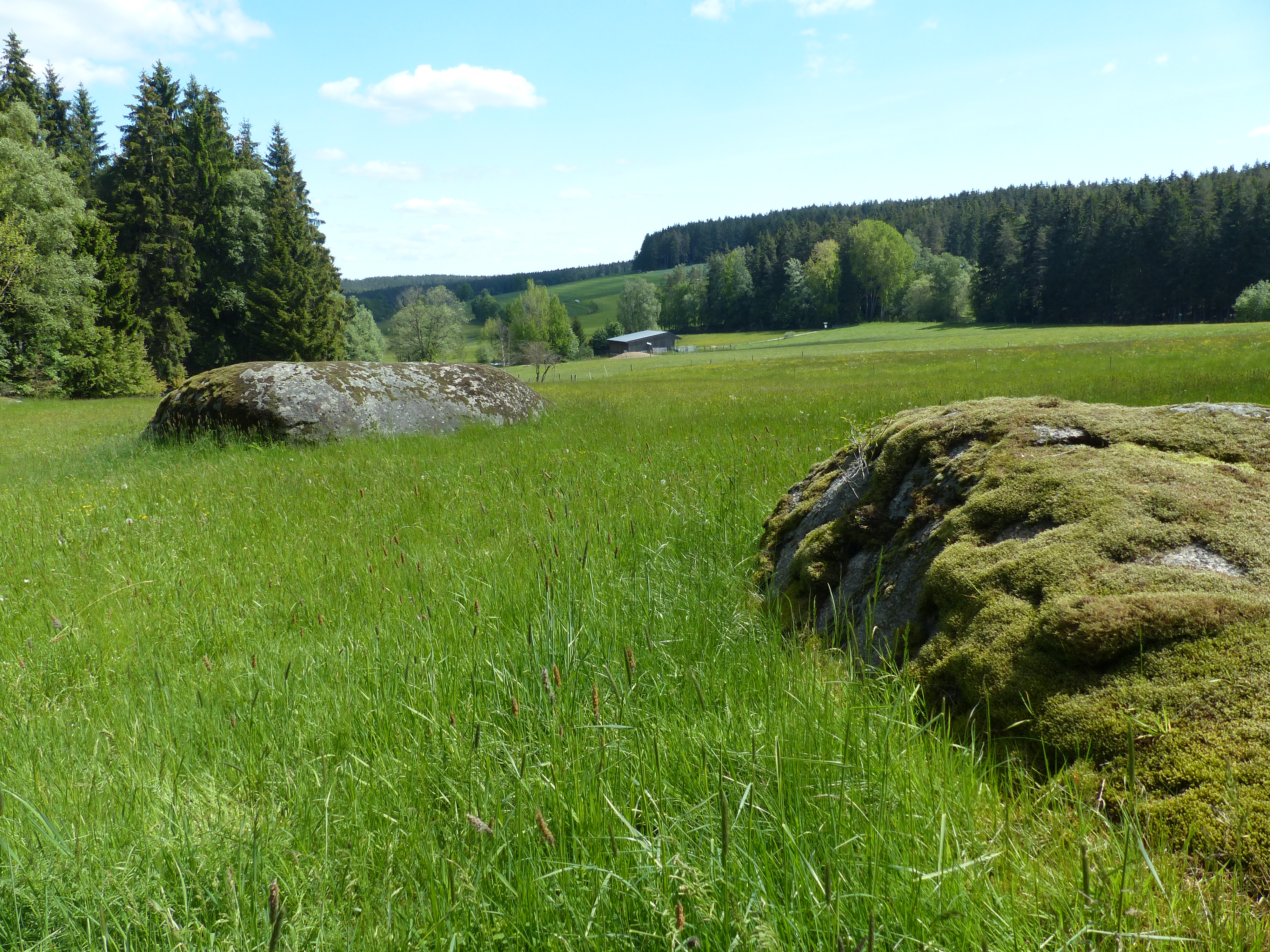 Kleinwendern